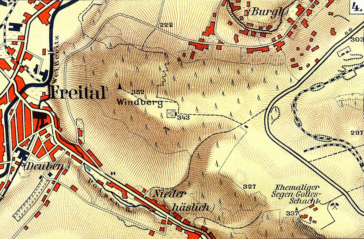 Geländedarstellung: Gebiet des Windbergs (Freital, Sachsen), Schraffen (1:25.000) This is a part of an old atlas. It does not represent the current situation.